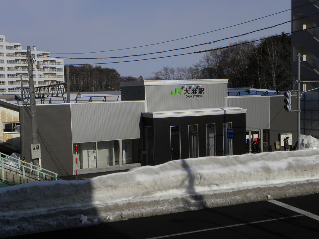 JR北海道 函館本線大麻駅南口駅舎 大麻駅南口の近くの歩道橋から撮影